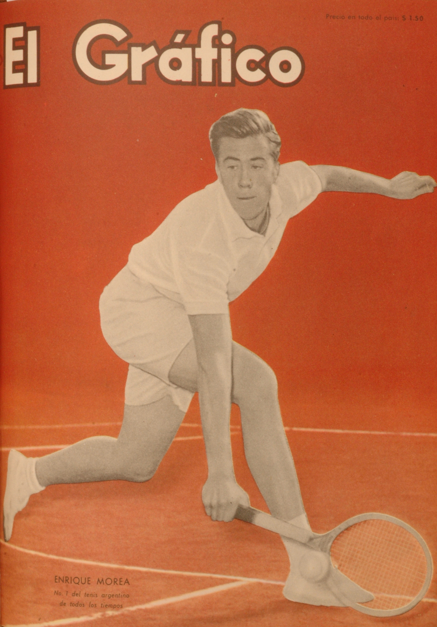 El Grafico del 09 de Julio de 1954. Edicion 1822